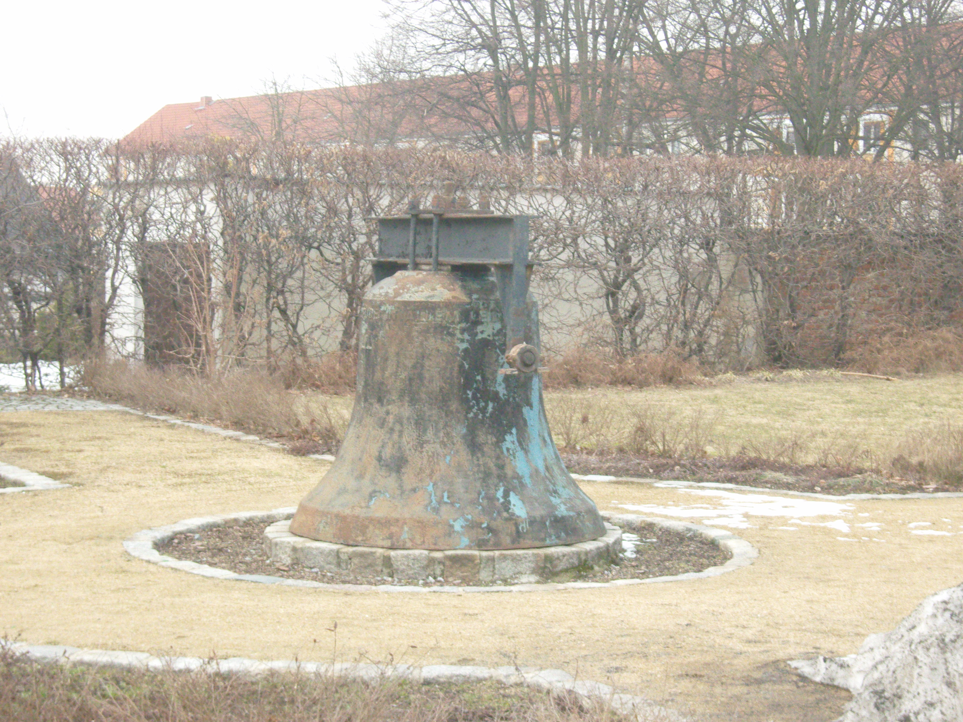 Glocke vor der St.-Jacobi-Kirche in Neustadt in Sachsen